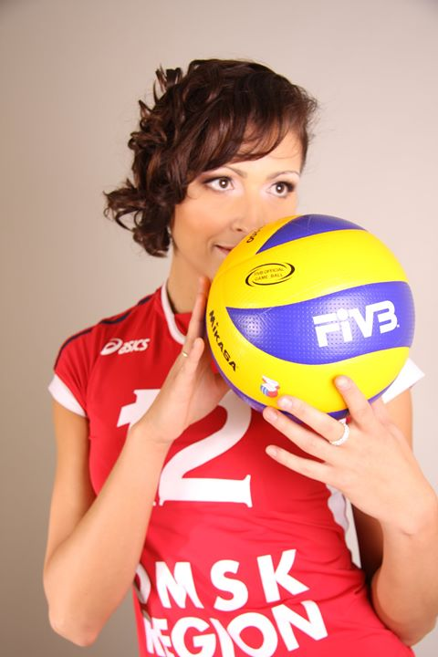 Волейболистка Ольга Житова.